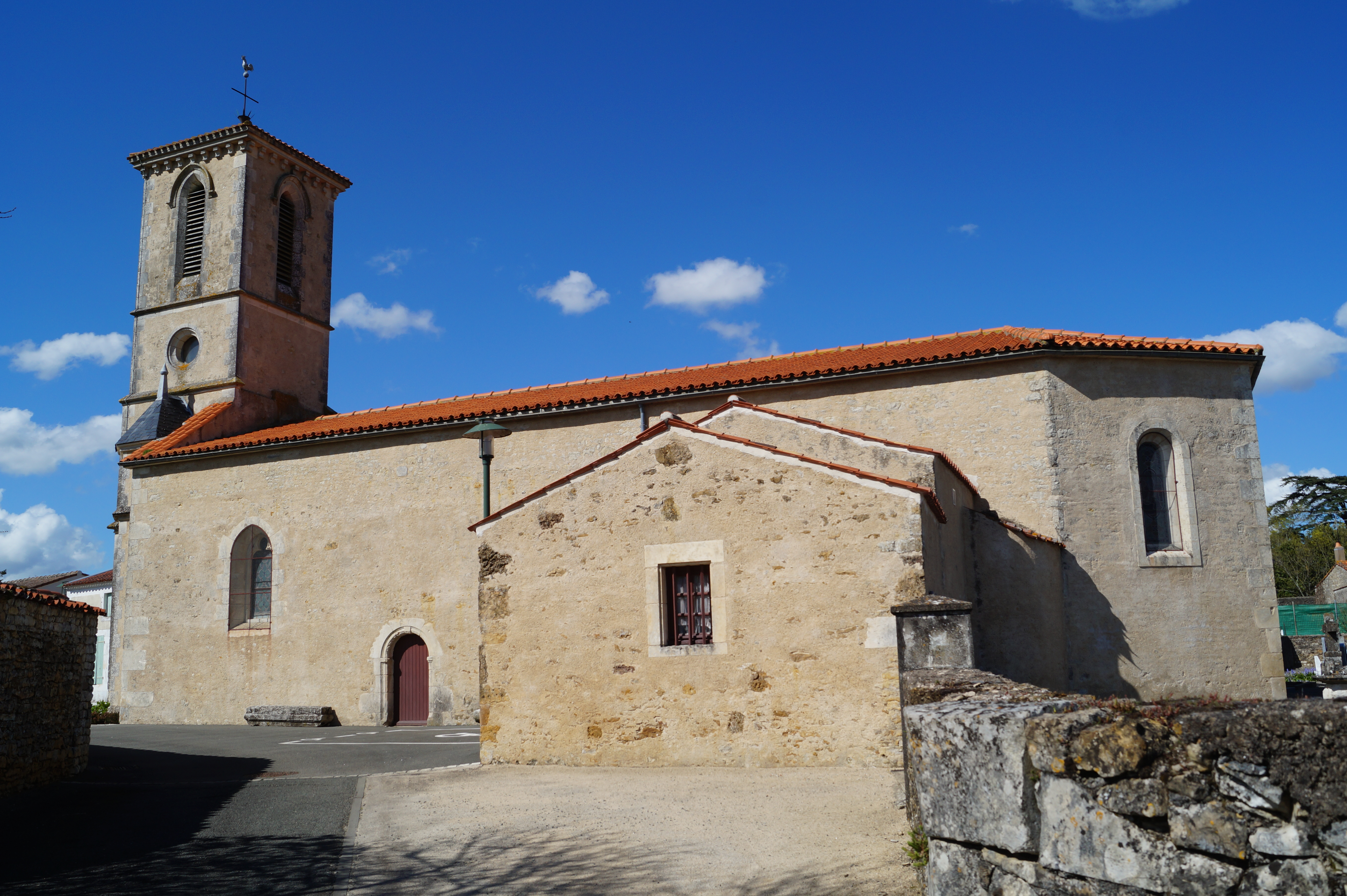 L’église Saint-Jean-Baptiste de Bessay depuis la rue de l’Église.